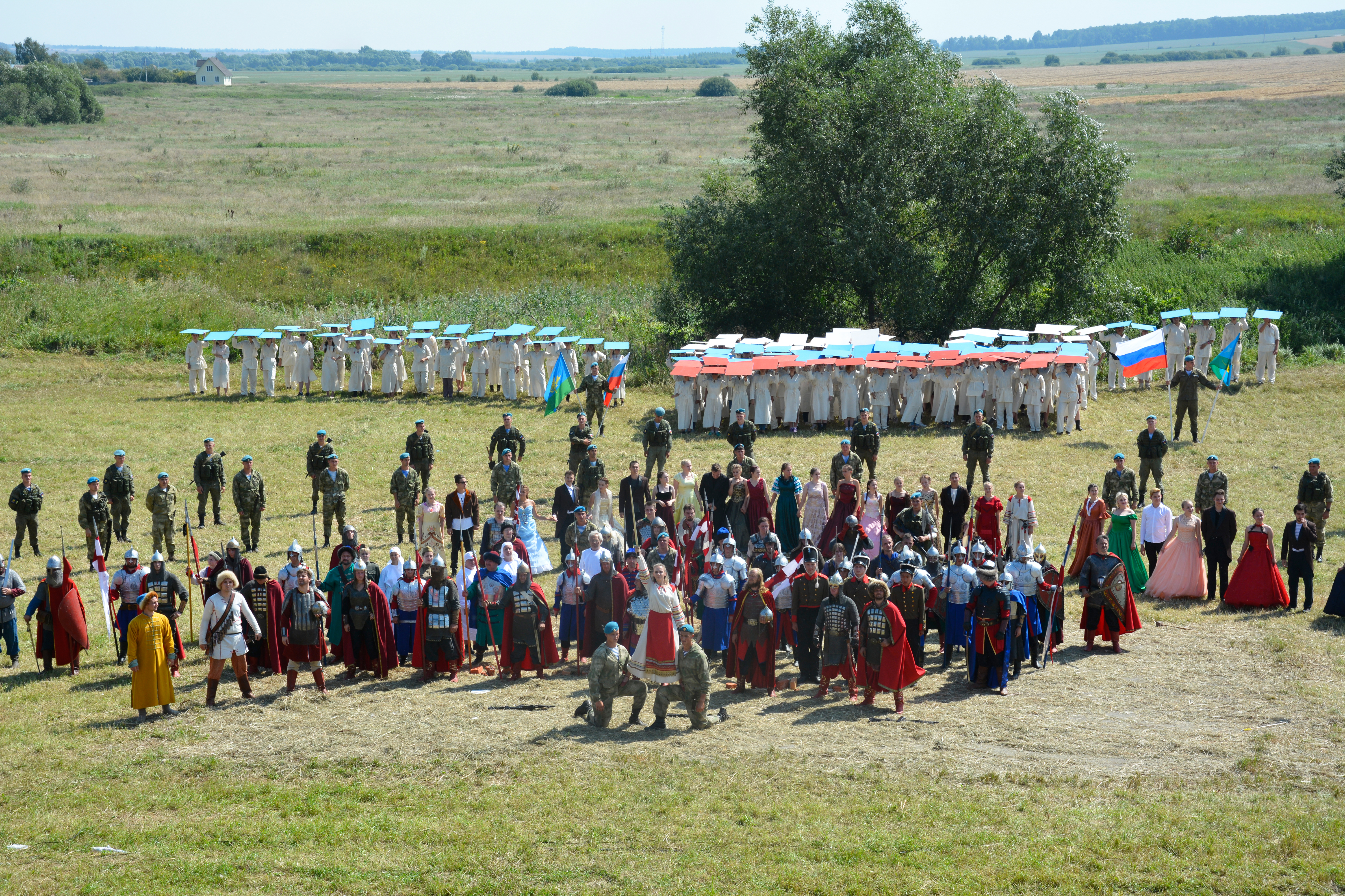 XVI Межрегиональный военно-исторический фестиваль «Битва на Воже». 04 августа 2018 года, с. Глебово-Городище Рыбновского района Рязанской области